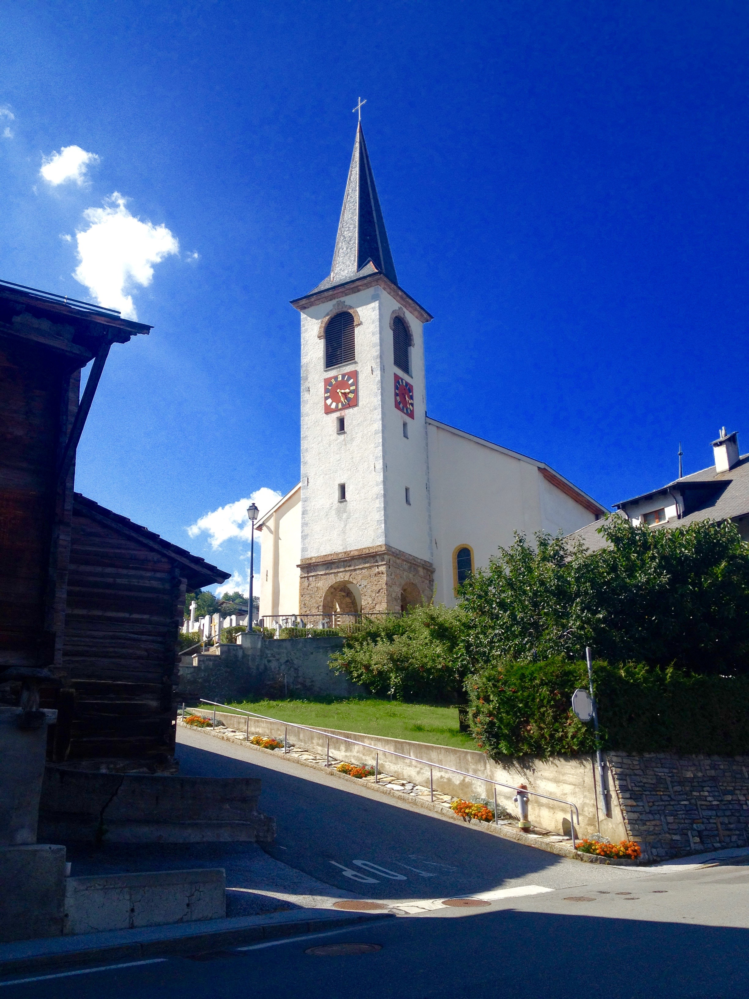 L'église catholique romaine Saint-Léger à Basse-Nendaz (VS).